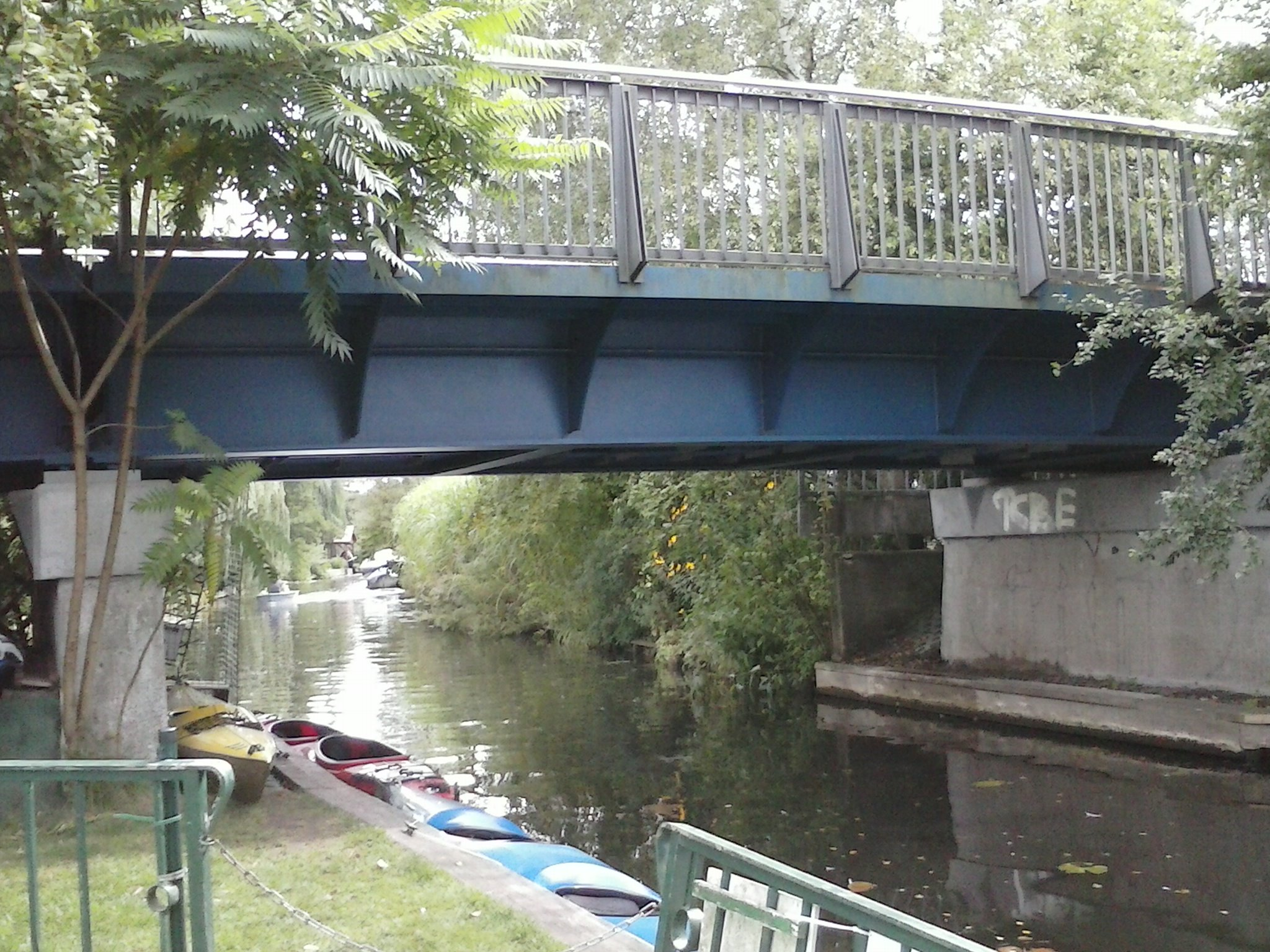 Die Kuckuckssteigbrücke ist eine einspurige Straßenbrücke im Berliner Ortsteil Rahnsdorf, Ortslage Neu-Venedig.